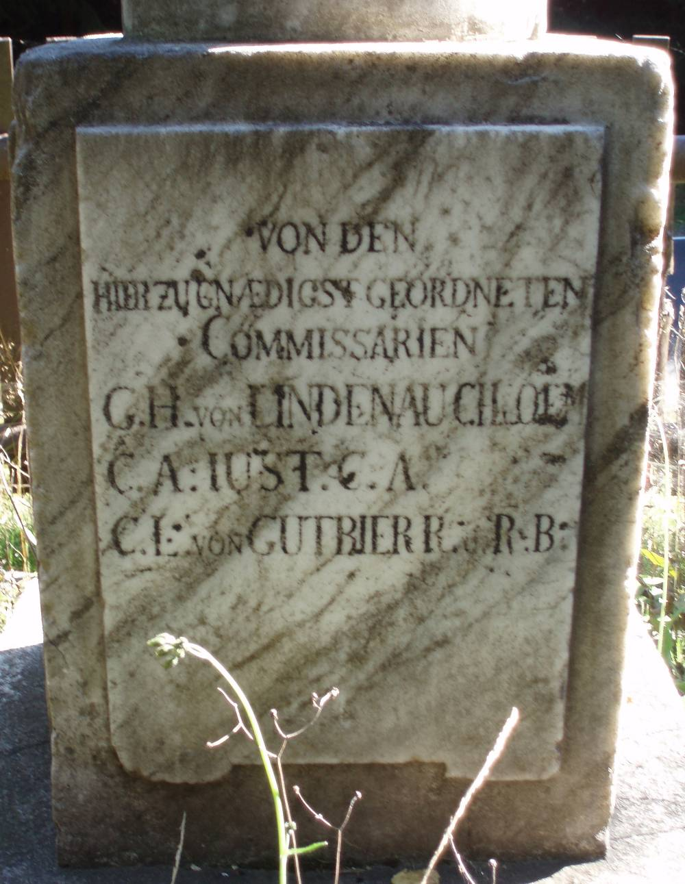 Weiße Frau. Gedenkstein von 1794, aufgestellt u. a. von G. H. von Lindenau